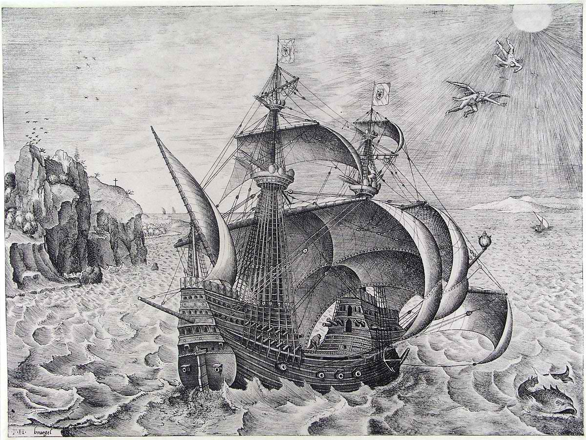 Kriegsschiff mit Fall des Icarus. Kupferstich nach einer Zeichnung Bruegels